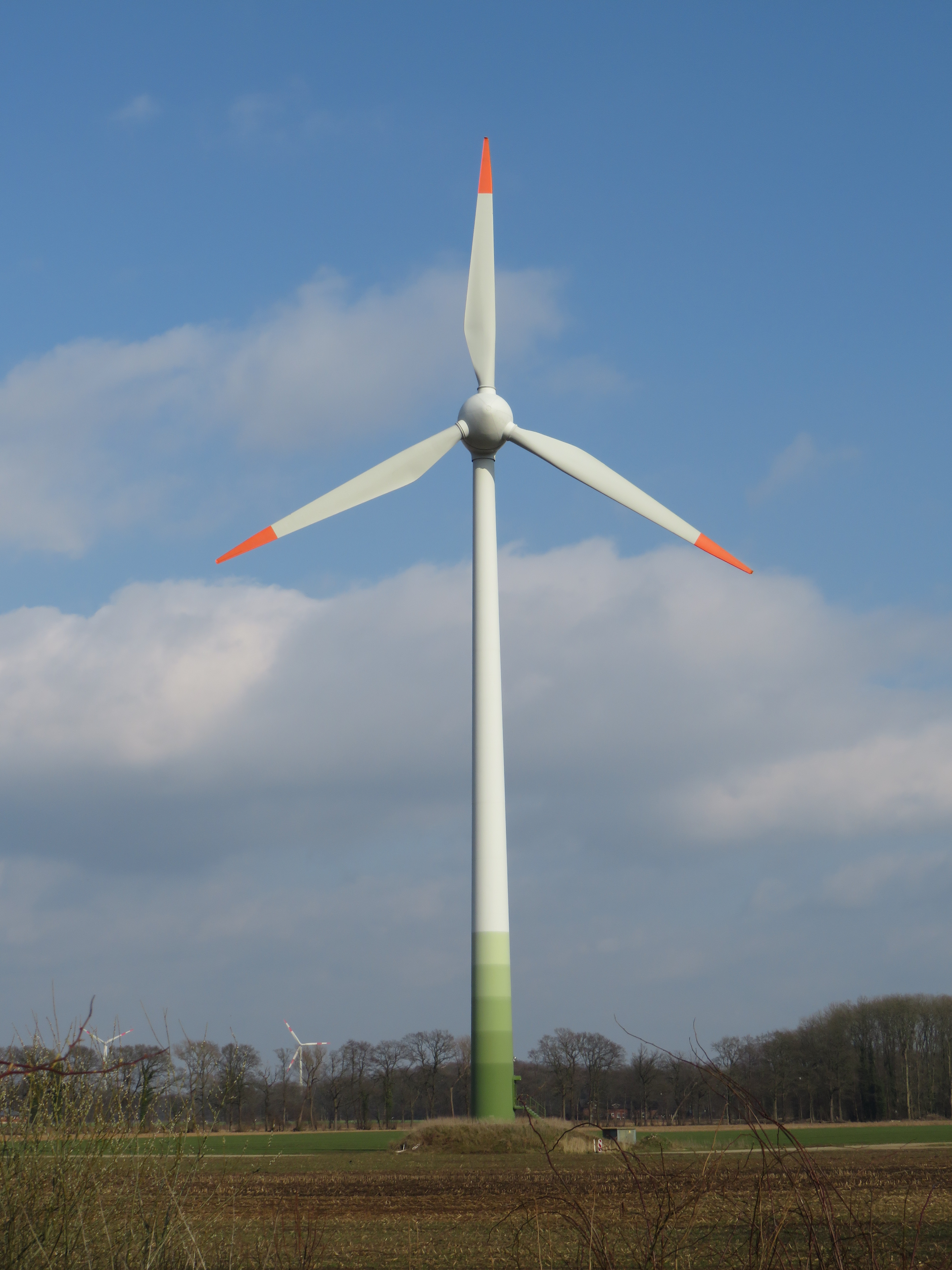 Windkraftanlage des Typs ENERCON E-58 mit 1,0 MW Nennleistung in Holdorf (Landkreis Vechta, Niedersachsen). BIld aufgenommen vom Rastplatz Langwege an der Bundesautobahn 1